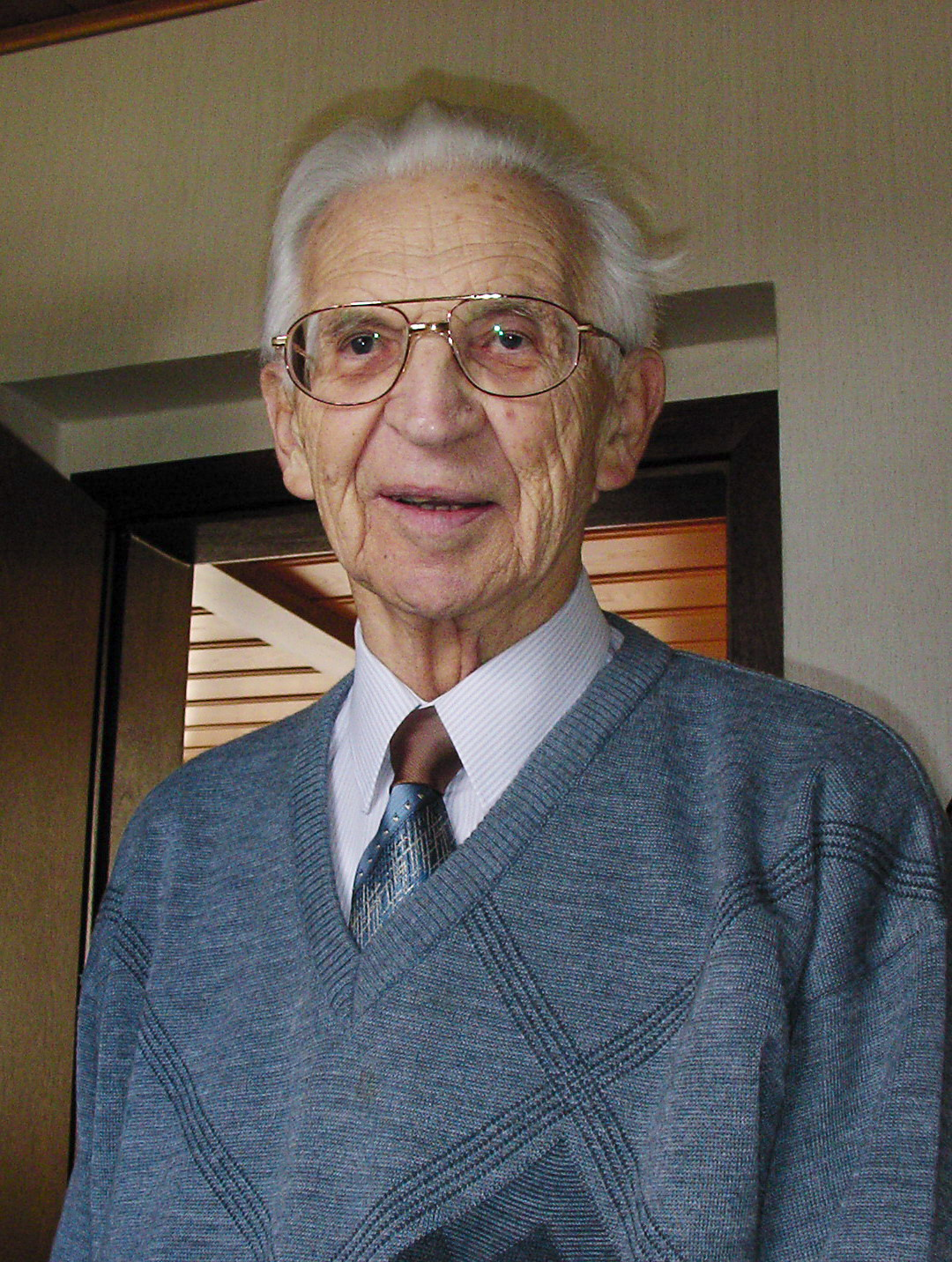 Franz Leitner 1.2.2005_1; eigene Aufnahme des Autors